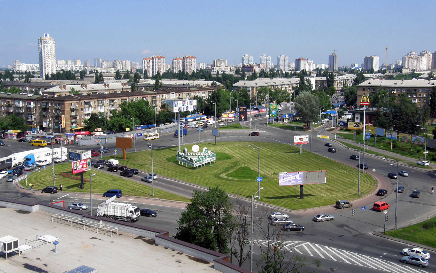 Дарницкая площадь